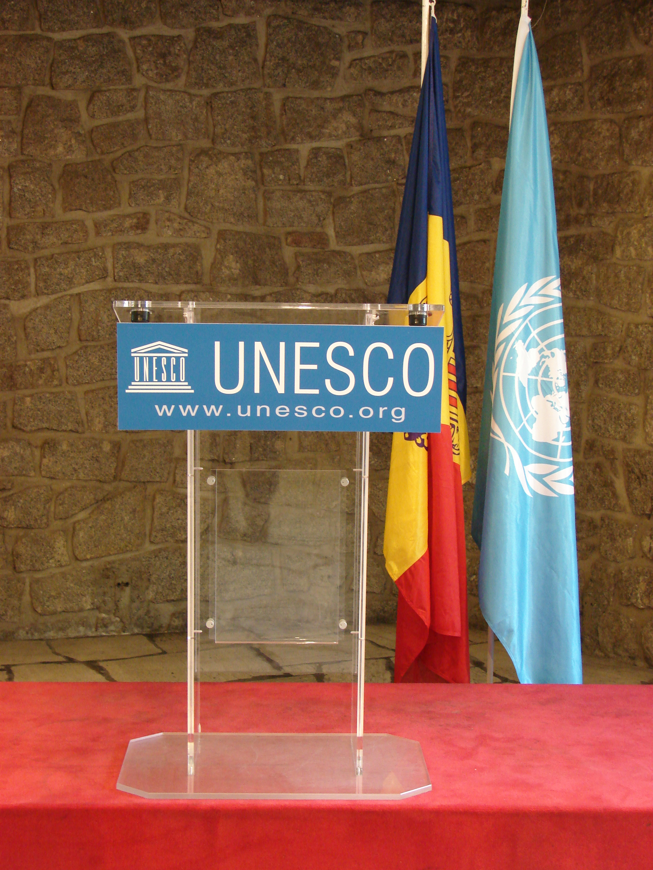 Pupitre à l'UNESCO